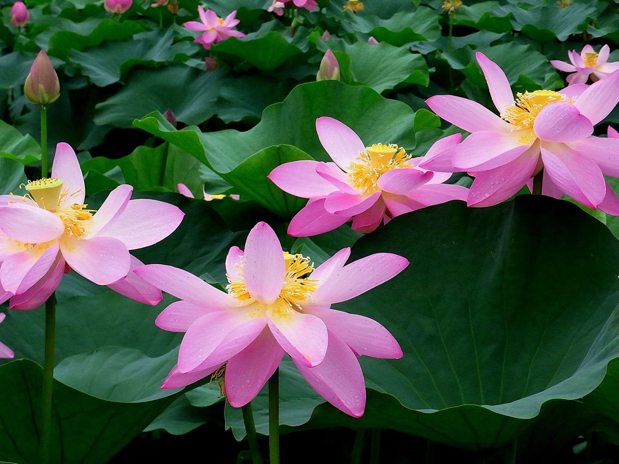 千葉県千葉市中央区弁天、千葉公園内の古代蓮（大賀蓮） Ricoh CX1